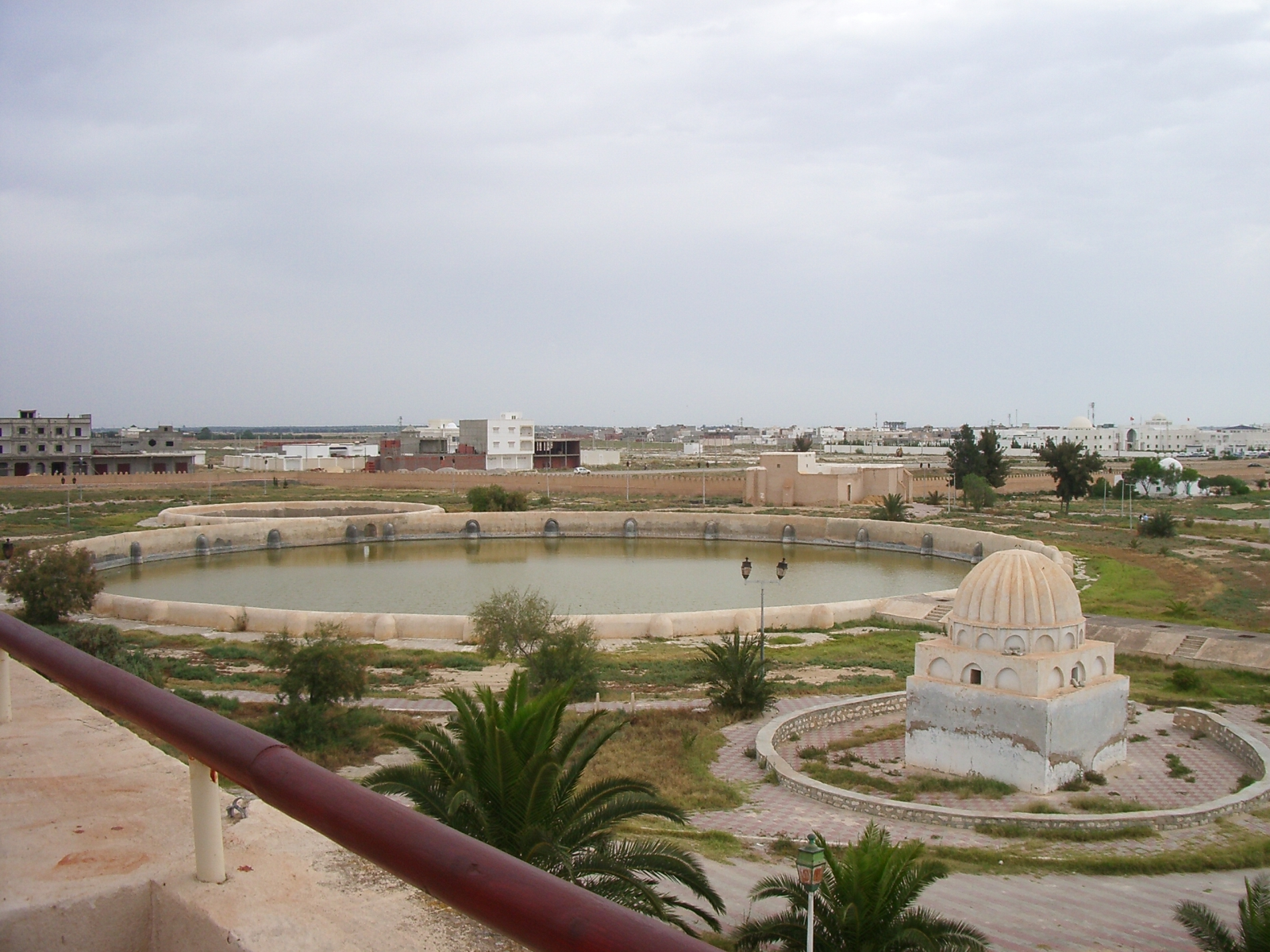 Bases dels aglàbides